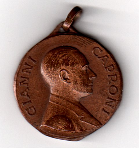 Medaglia di bronzo Gianni Caproni - 25 anni di aviazione 1910 - 1935- recto